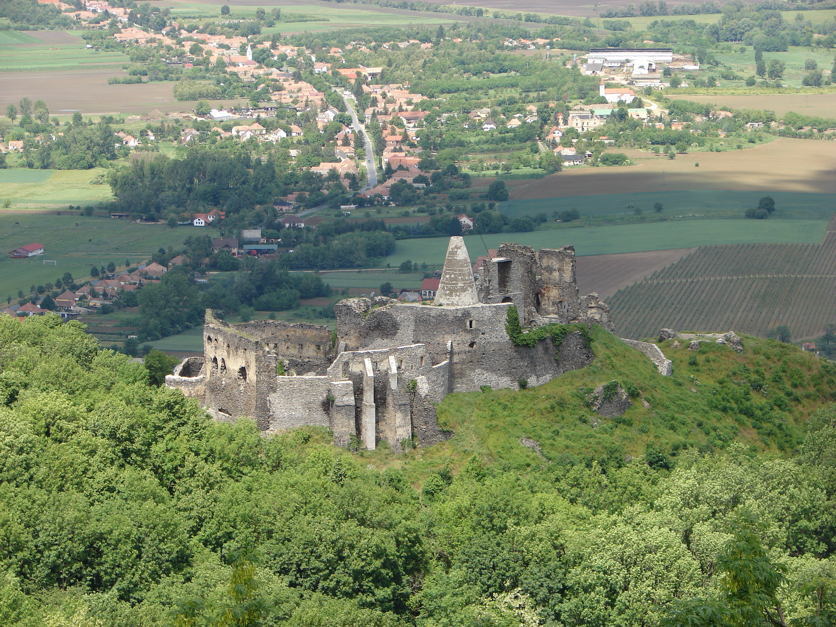 Somló vár romjai, a háttérben Somlószőlős This is a photo of a monument in Hungary. Identifier: 9845